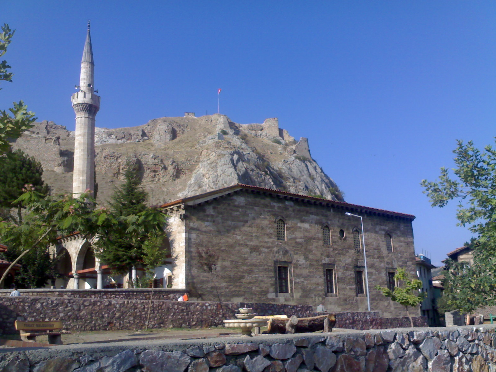 TOKAT KALESİ